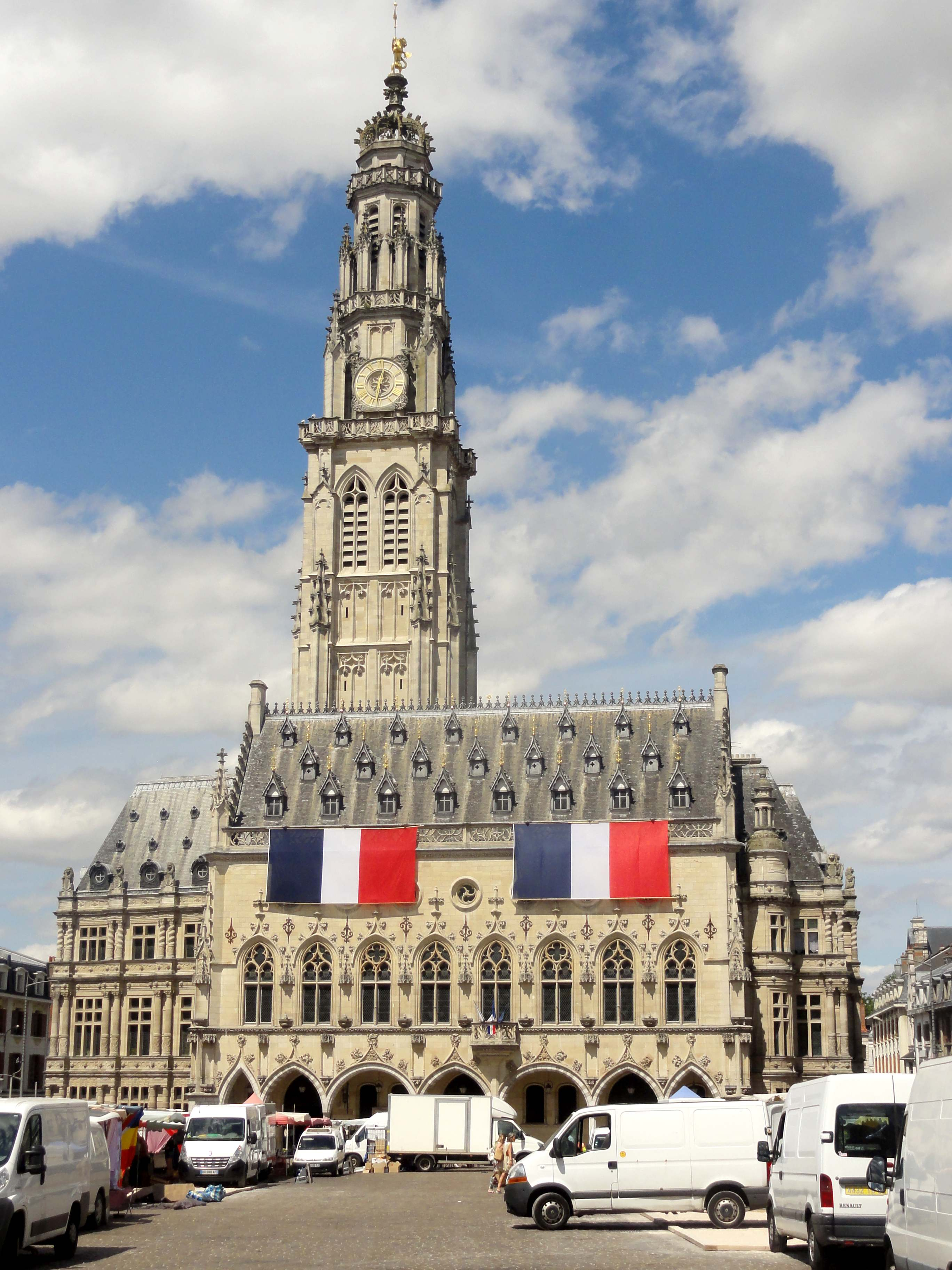 Hôtel de ville d'Arras - voir le titre du fichier.